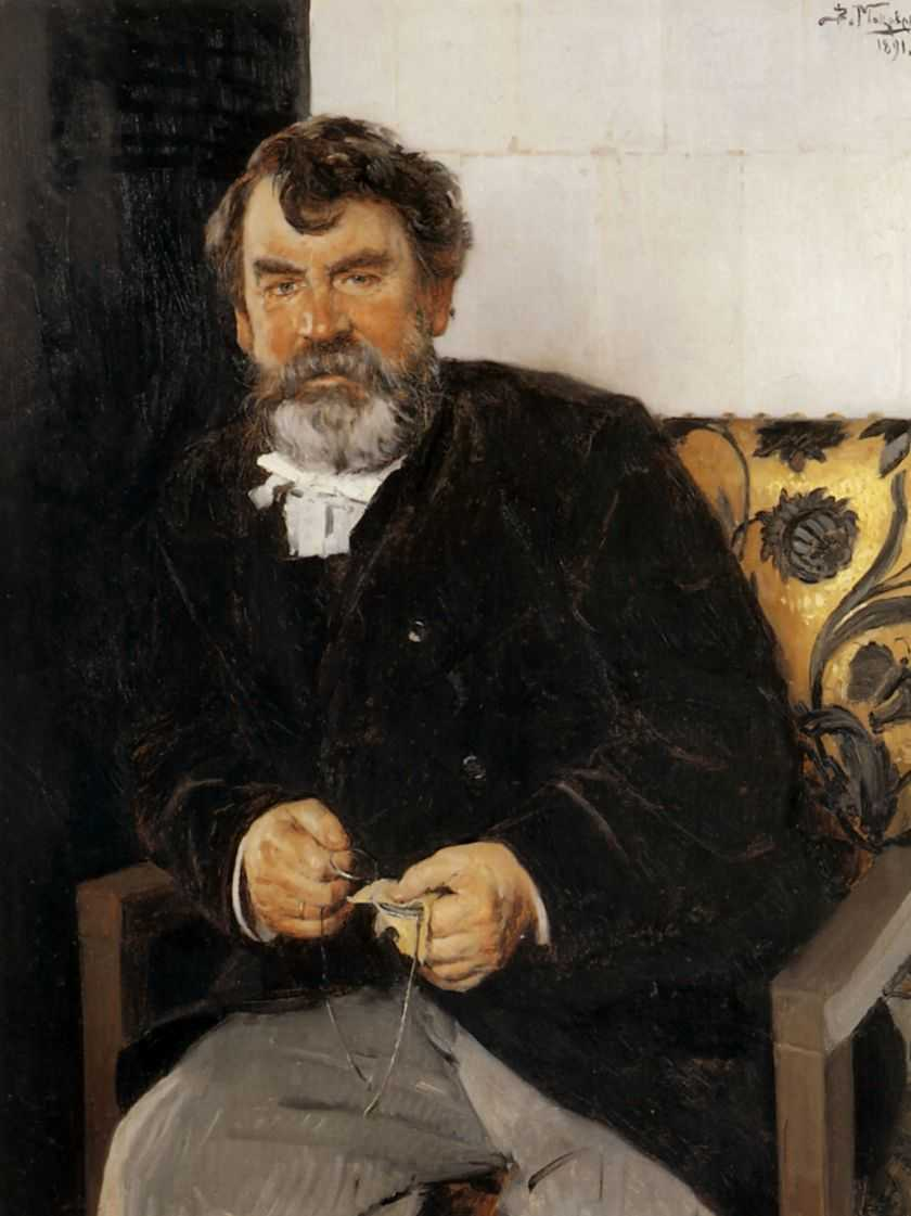 Маковский Владимир Егорович. Портрет Е.С.Сорокина. 1891